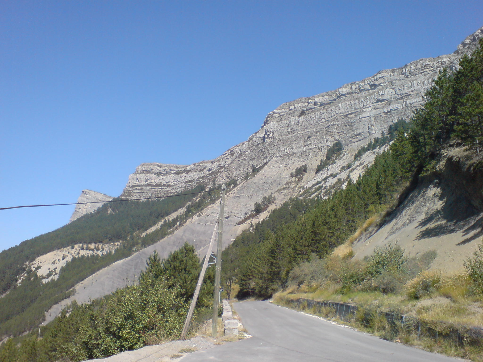 Barre dominant le col de Corobin, sur la RD 20, à Chaudon-Norante